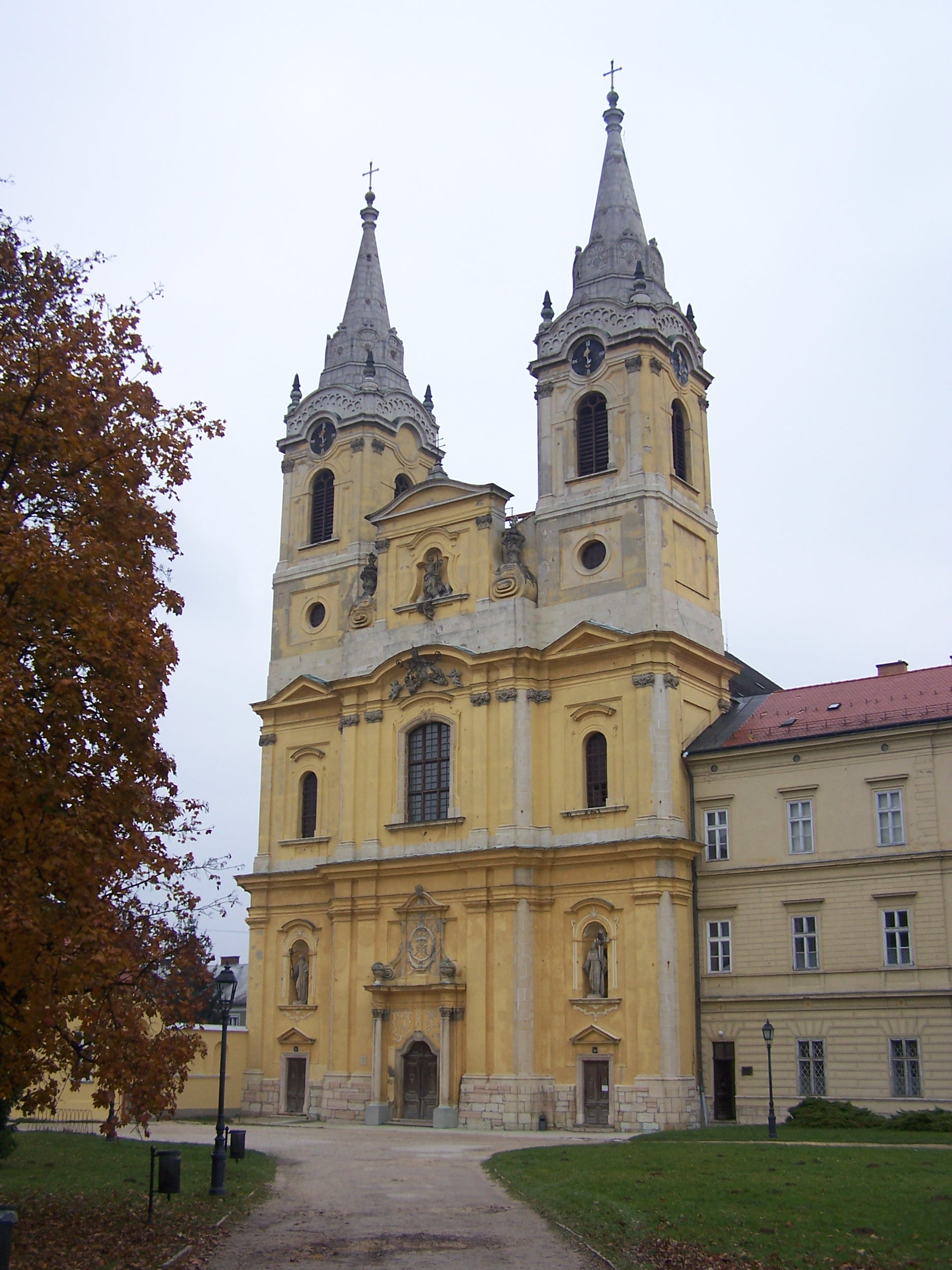 Cisztercita Nagyboldogasszony templom (Zirc, Köztársaság útja) This is a photo of a monument in Hungary. Identifier: 10747